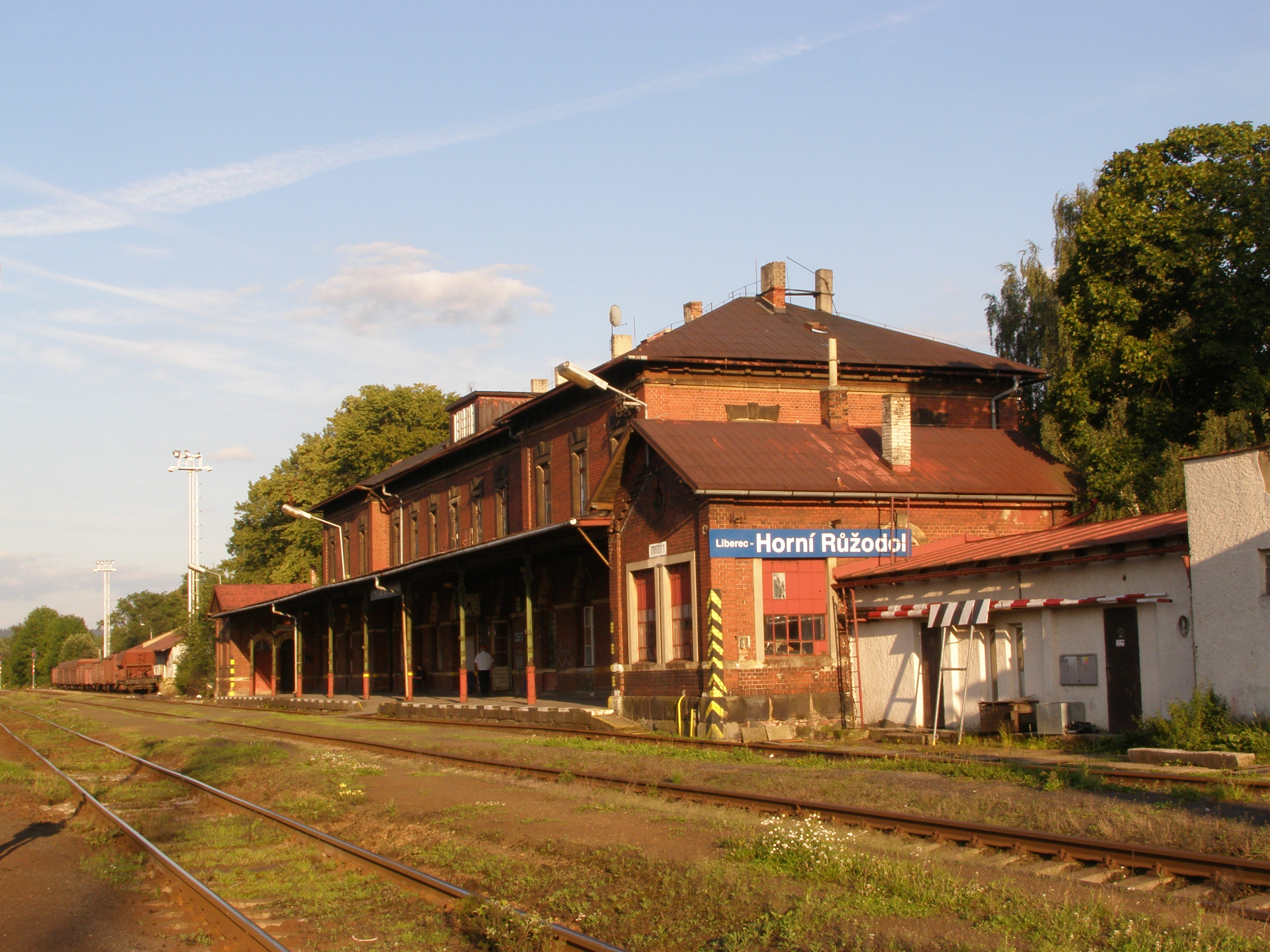 Pohled na liberecké nádraží Horní Růžodol ve směru od Ostašova